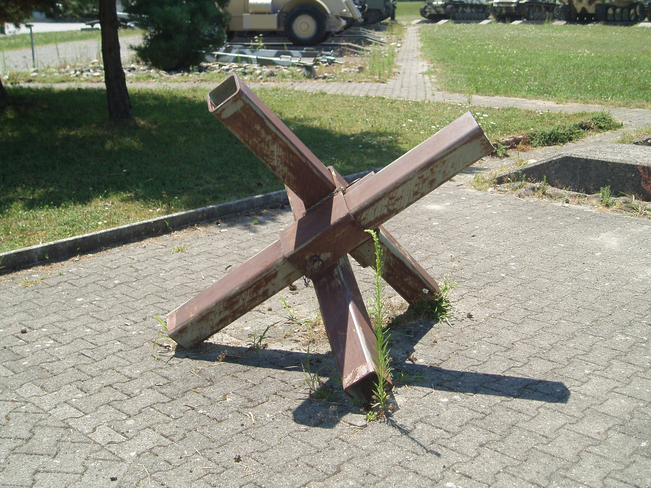 Spanischer Reiter, Zerlegbare Panzersperre (auch: Tschechenigel, Panzerigel oder Stahlspinne genannt)